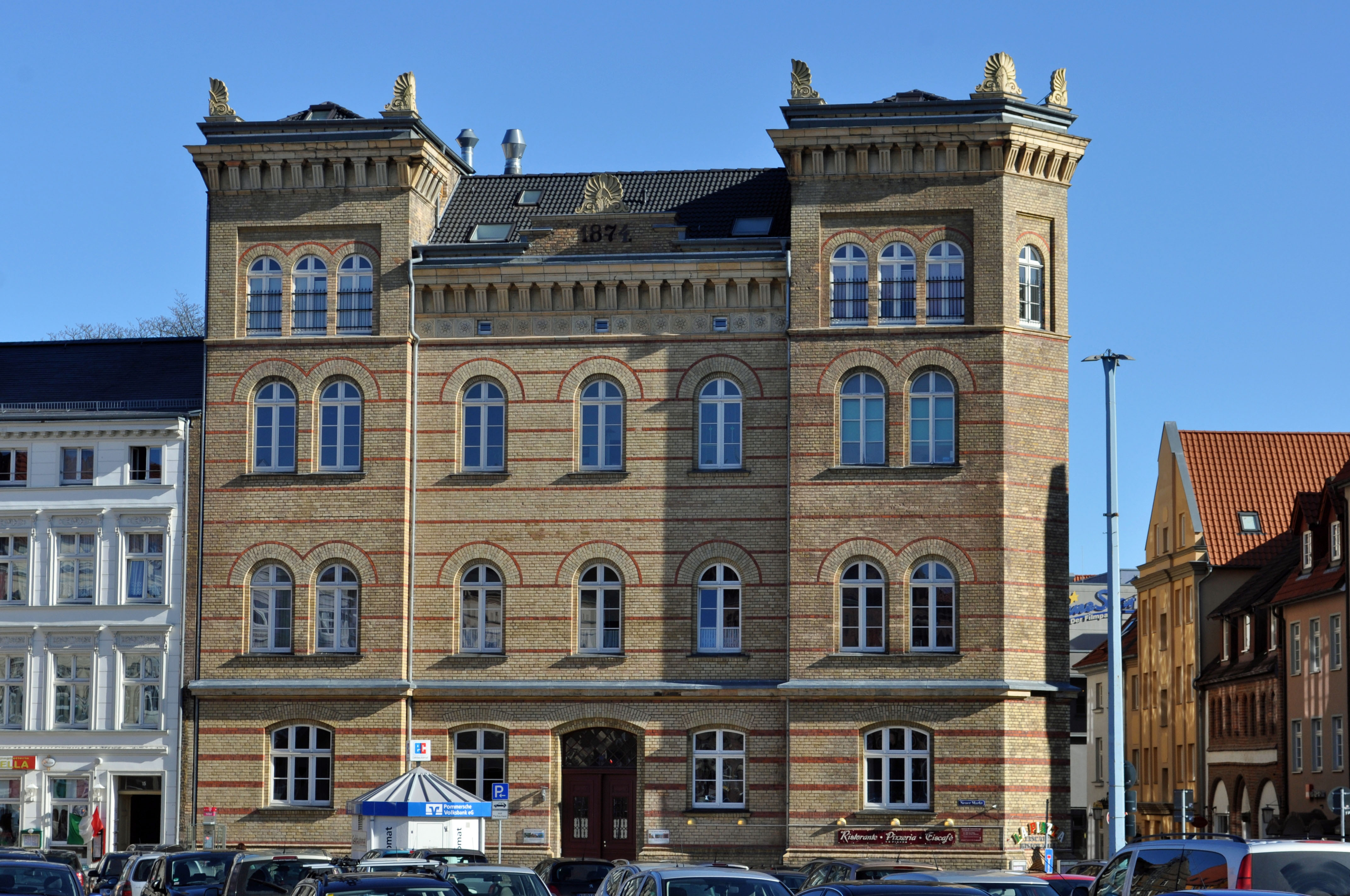 Gebäude bzw. Gebäudedetail in Stralsund. Straße und Hausnummer siehe Dateiname. Das Gebäude ist als Baudenkmal ausgewiesen, siehe dazu die Liste der Baudenkmale in Stralsund.